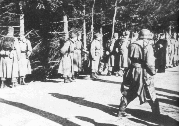 Disarmed Danish soldiers in Bjergskov, Denmark, April 9, 1940